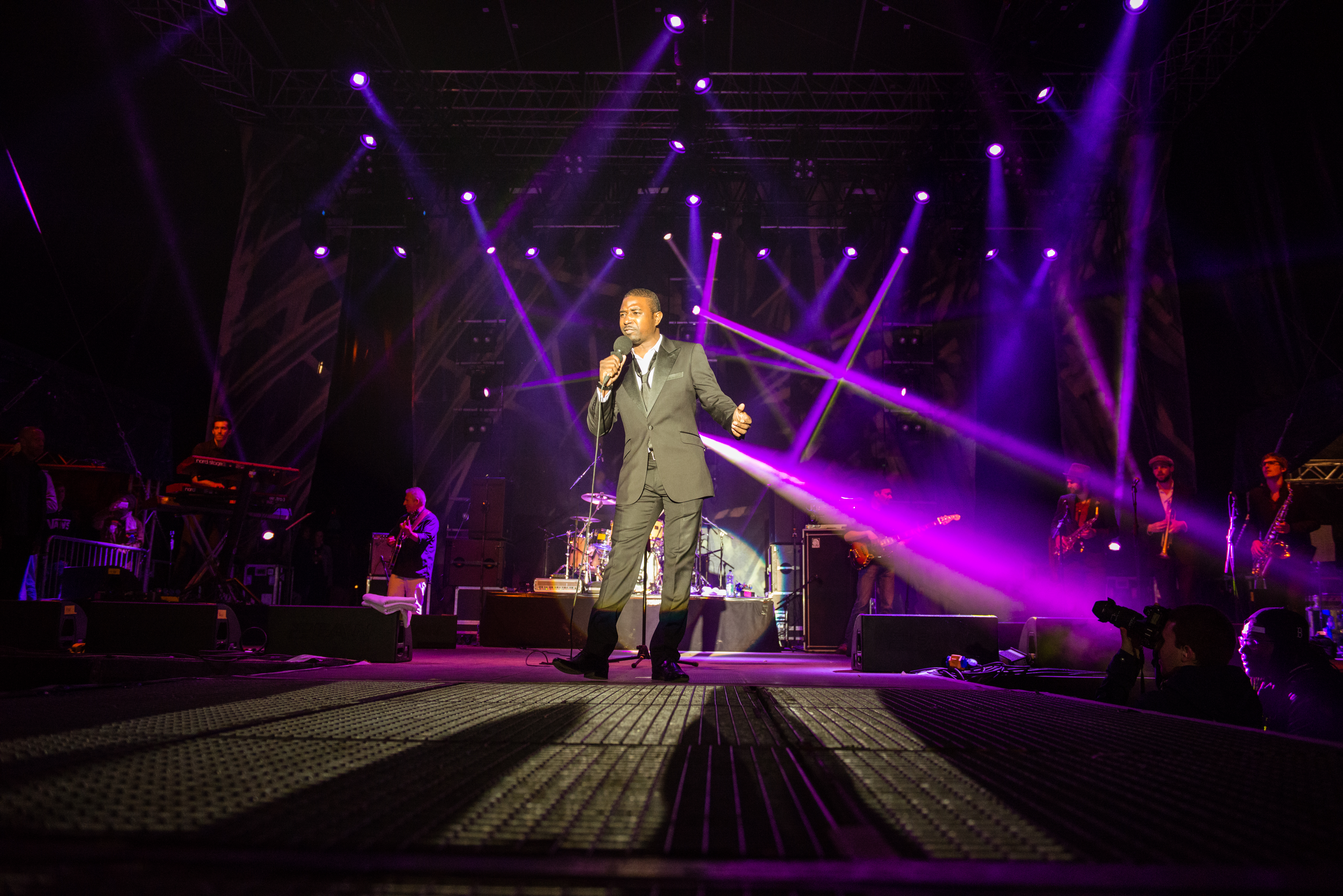 'Ruhr Reggae Summer 2014 - Dortmund': 'Bitty McLean'